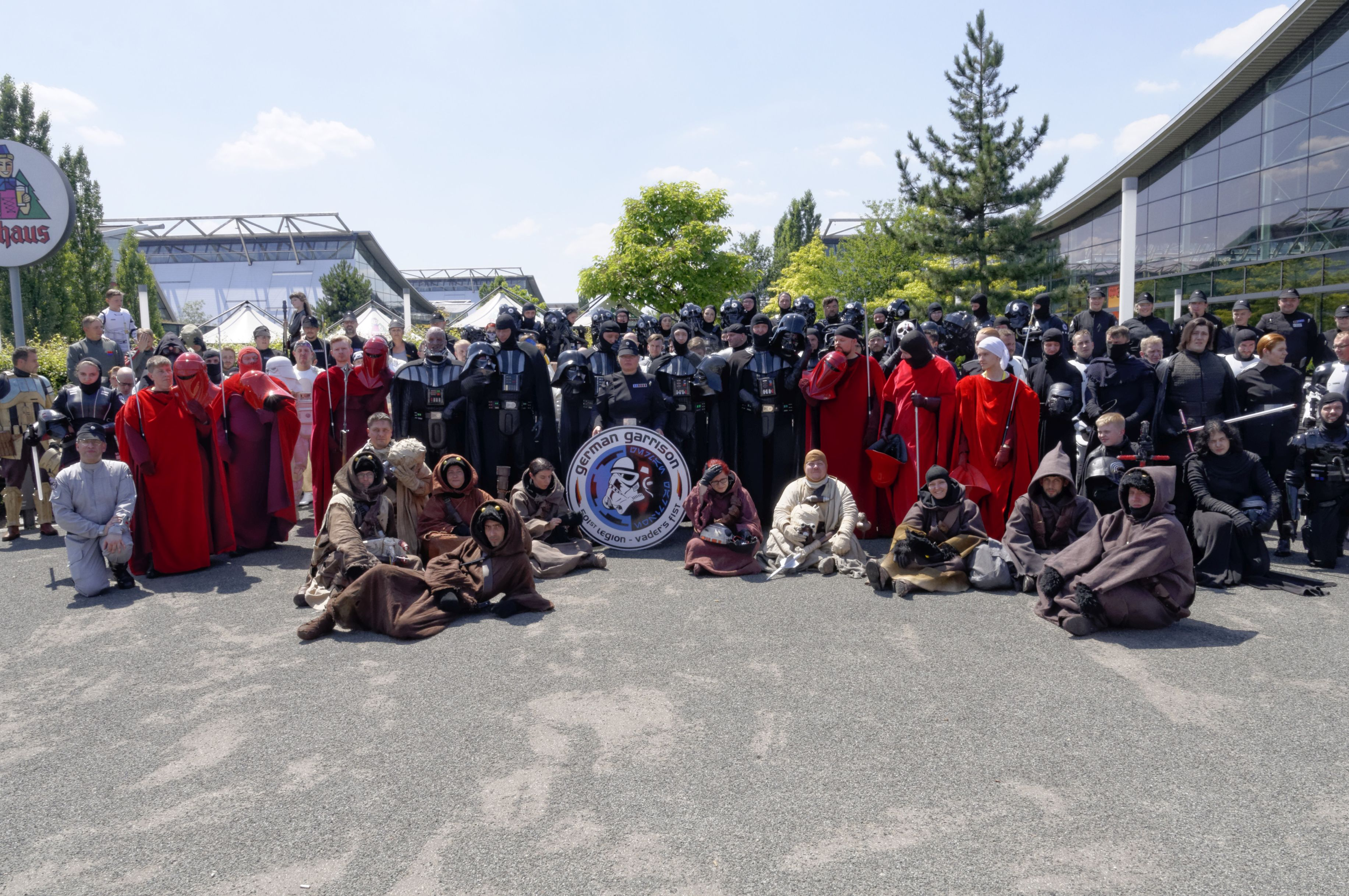 Bilder von der Comic Con Germany in Stuttgart 2018